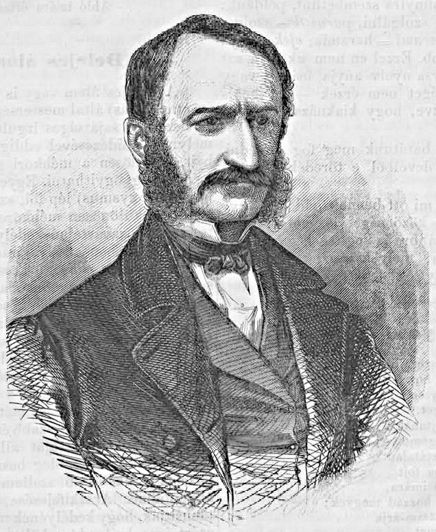 Duka Tivadar (1825–1908) honvéd százados, brit őrnagy, orvos, az MTA tagja. (Vasárnapi Ujság, 1862. június 15.)